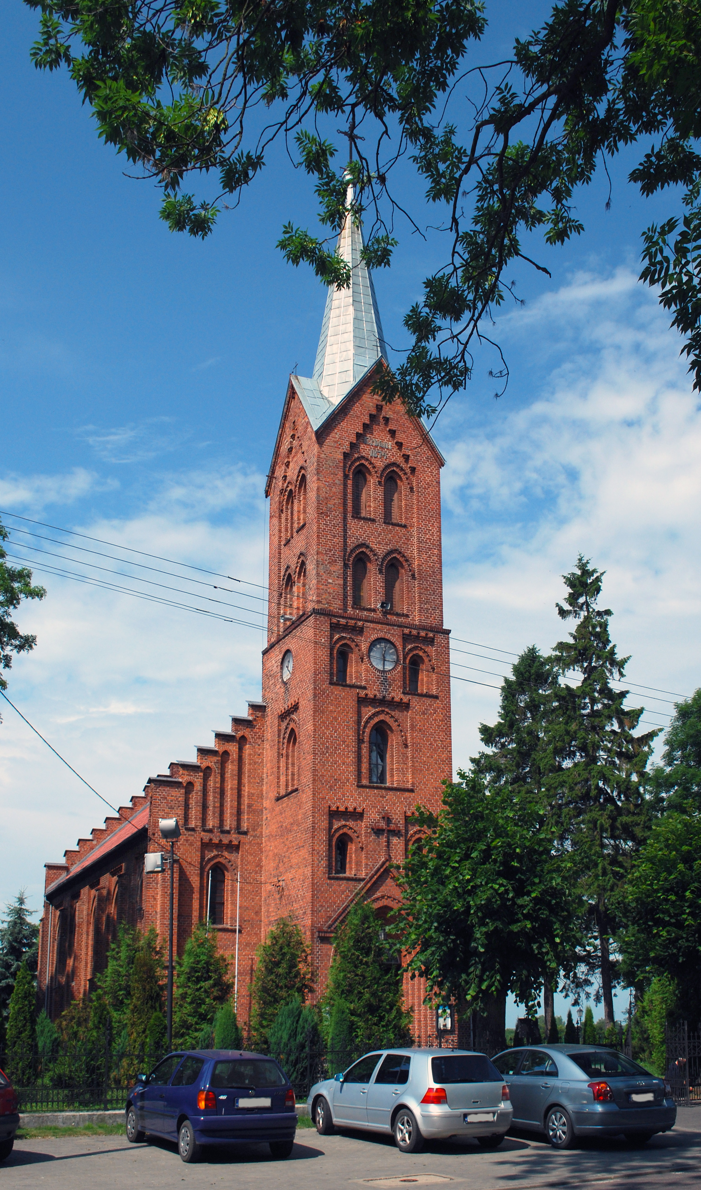 Kościół św. Jana Baptysty w Ostaszewie.